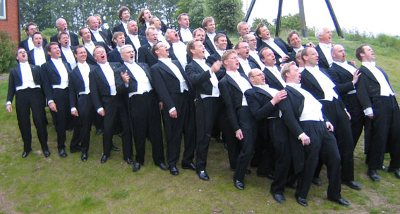 Den norske Studentersangforening etter å ha vunnet mannskorklassen i Musica Mundi's korkonkurranse i Helsingborg i Sverige i 2004.